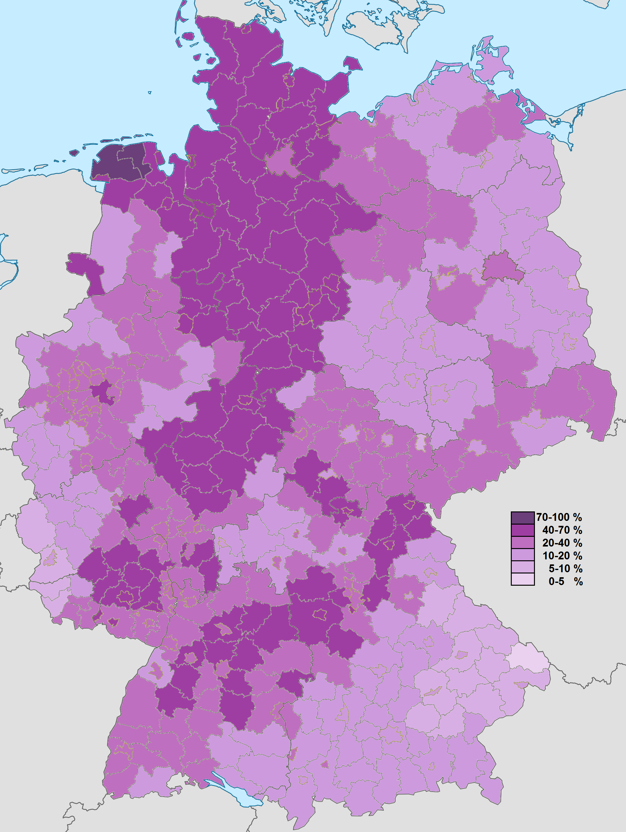 Anteil der evangelischen Bevölkerung auf Landkreisebene nach Ergebnissen des Zensus 2011 in Deutschland.